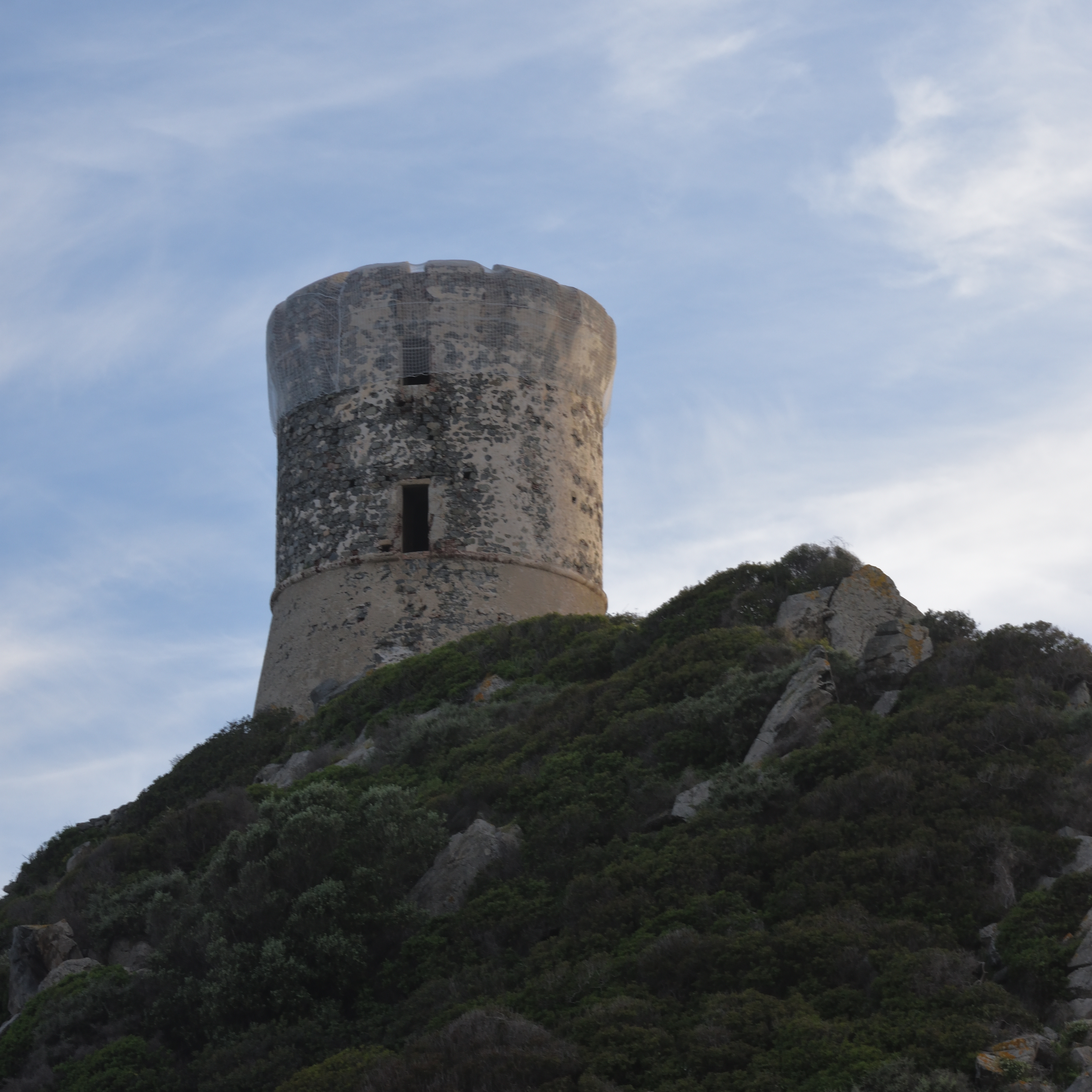 Tour genovèse de la Parata près d`Ajaccio en Corse